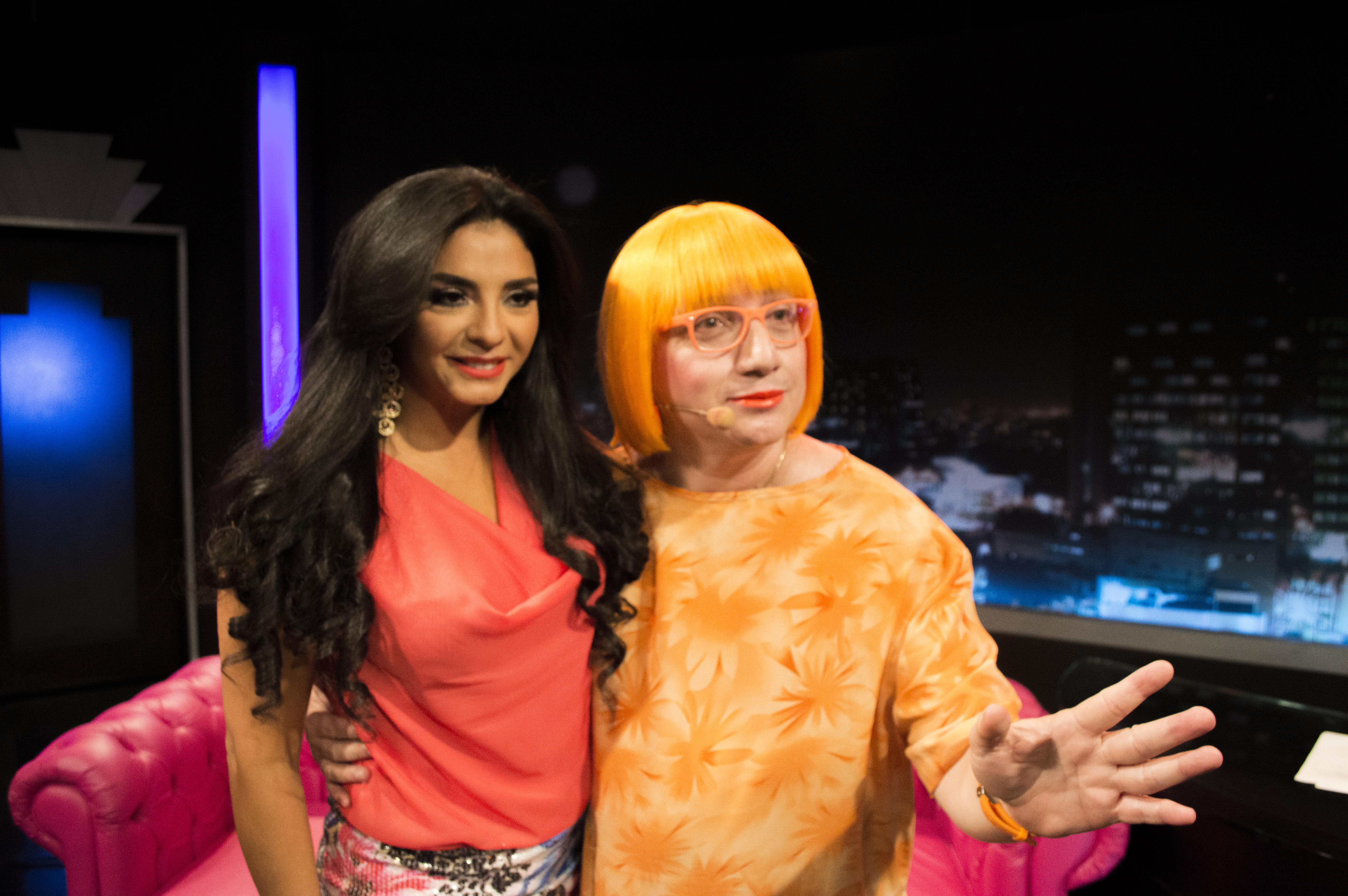 Tomás Delgado como La Vecina junto a Paola Farías en Te Tomaste la Noche (TTN).